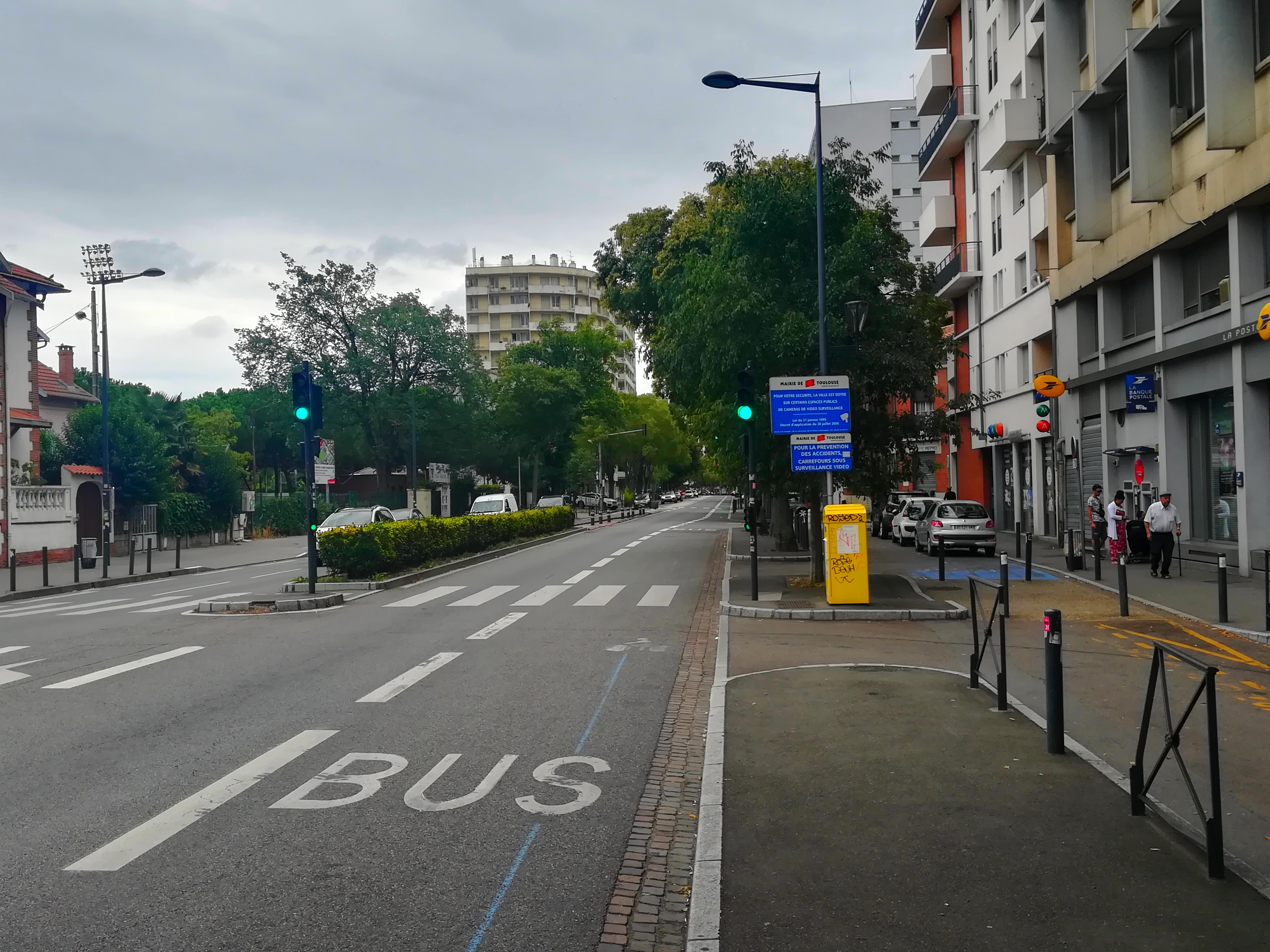 L'avenue des Minimes à Toulouse.